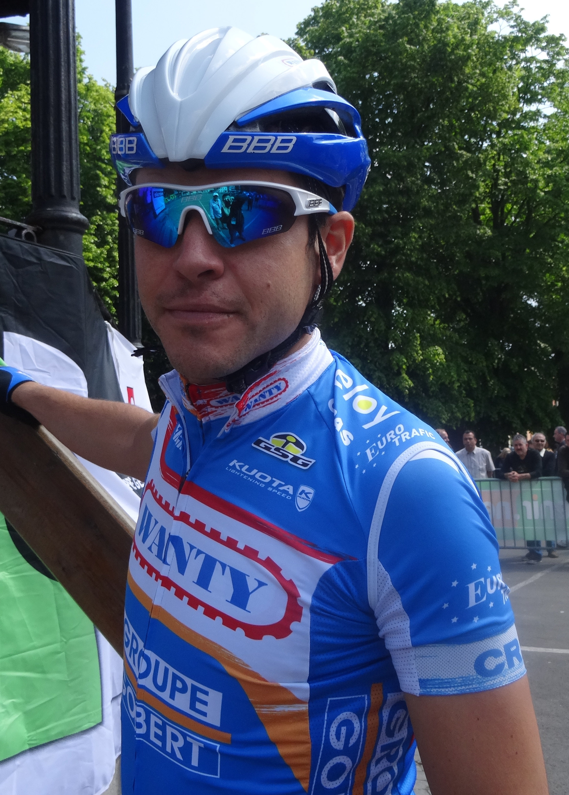 Reportage réalisé le samedi 17 mai à l'occasion du départ du Grand Prix Criquielion 2014 à Boussu, Belgique.